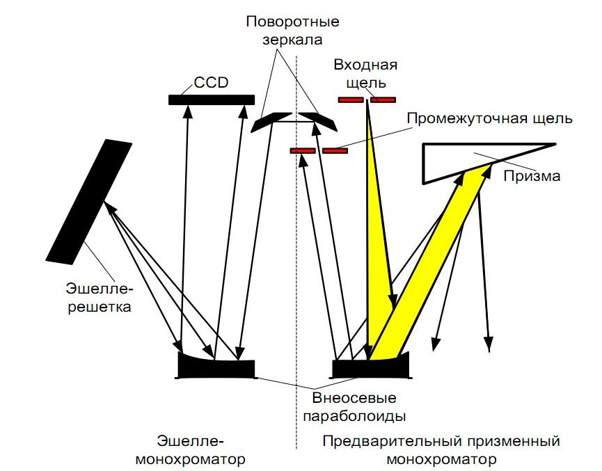 Ход оптических лучей в спектрометре высокого разрешения с непрерывным источником спектра продвижение сайта Киев